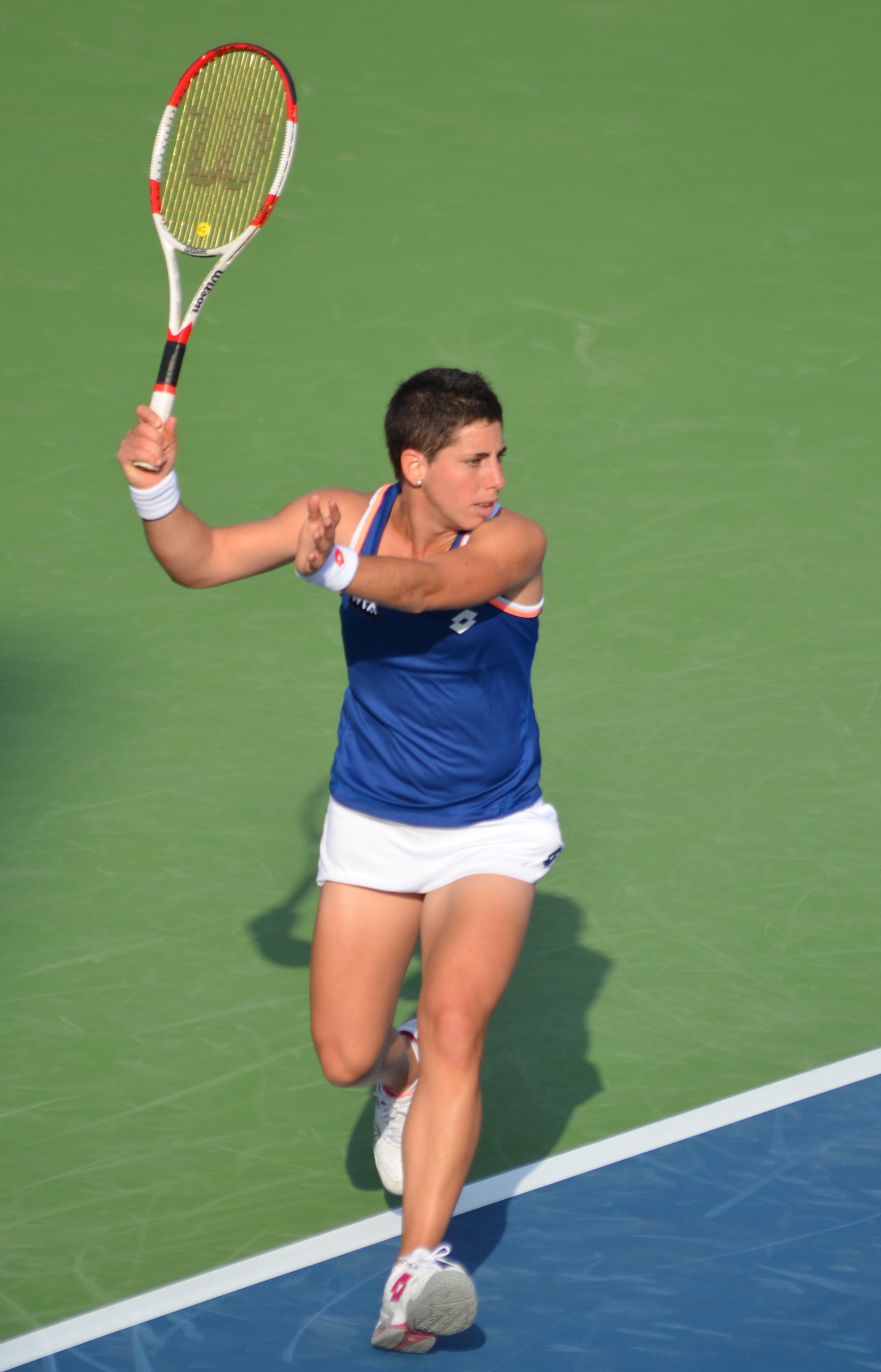 Carla Suarez-Navarro v Nadia Petrova